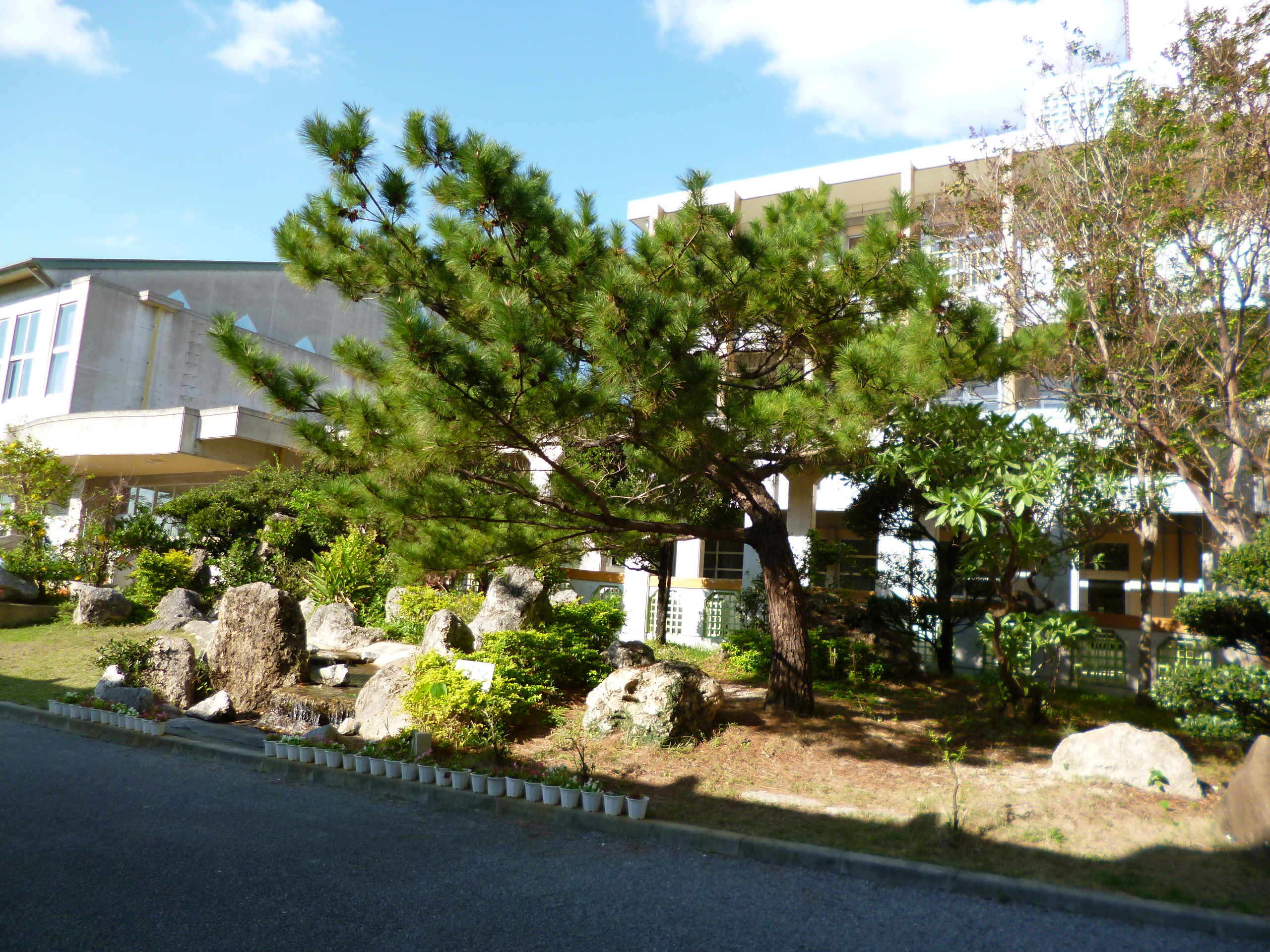 潮平中学校ドリーム庭園